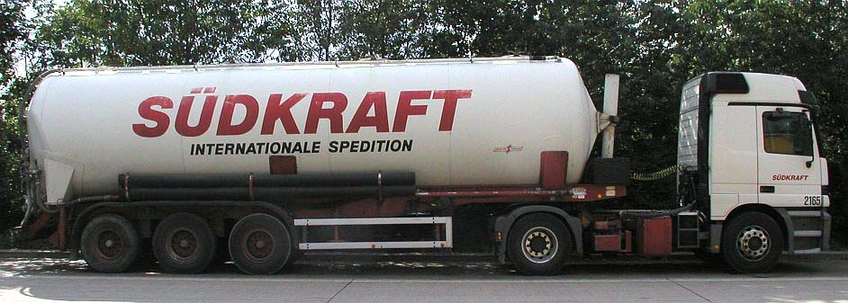 Kippsilofahrzeug von Spitzer